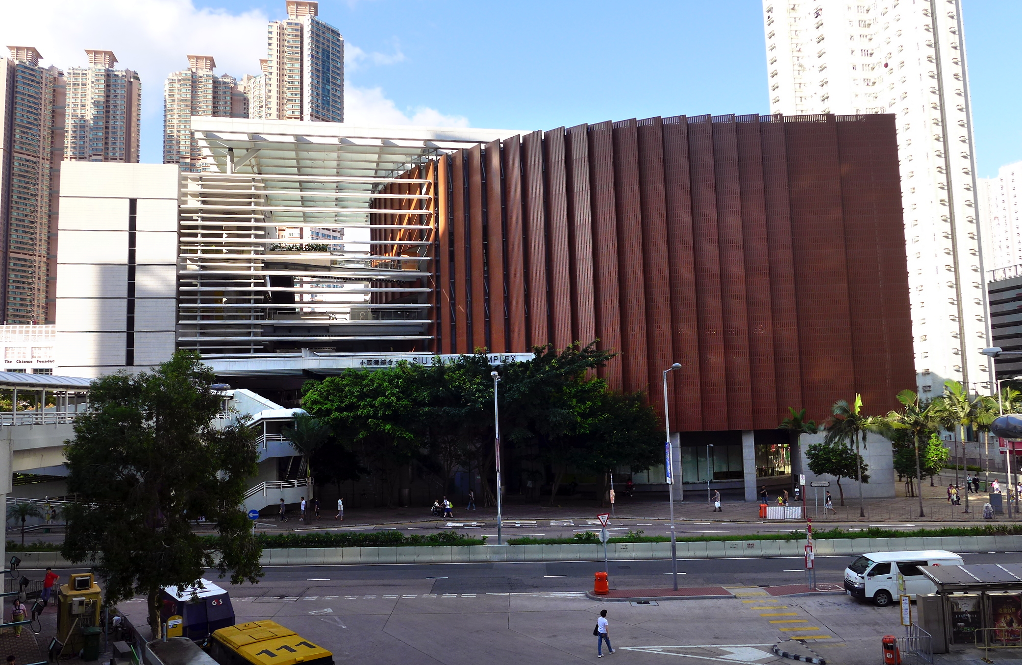 Siu Sai Wan Complex